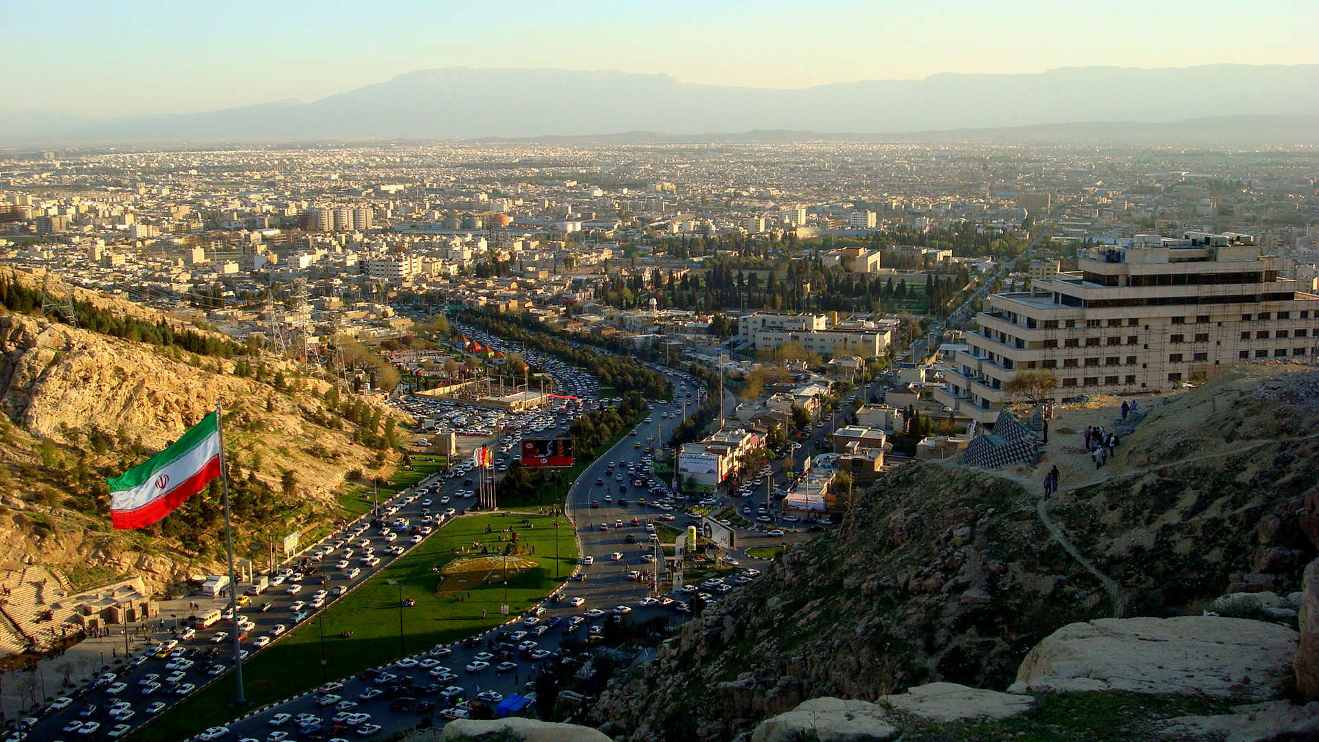 نمایی از شهر شیراز از بالای کوه مشرف به دروازه قرآن - شیراز